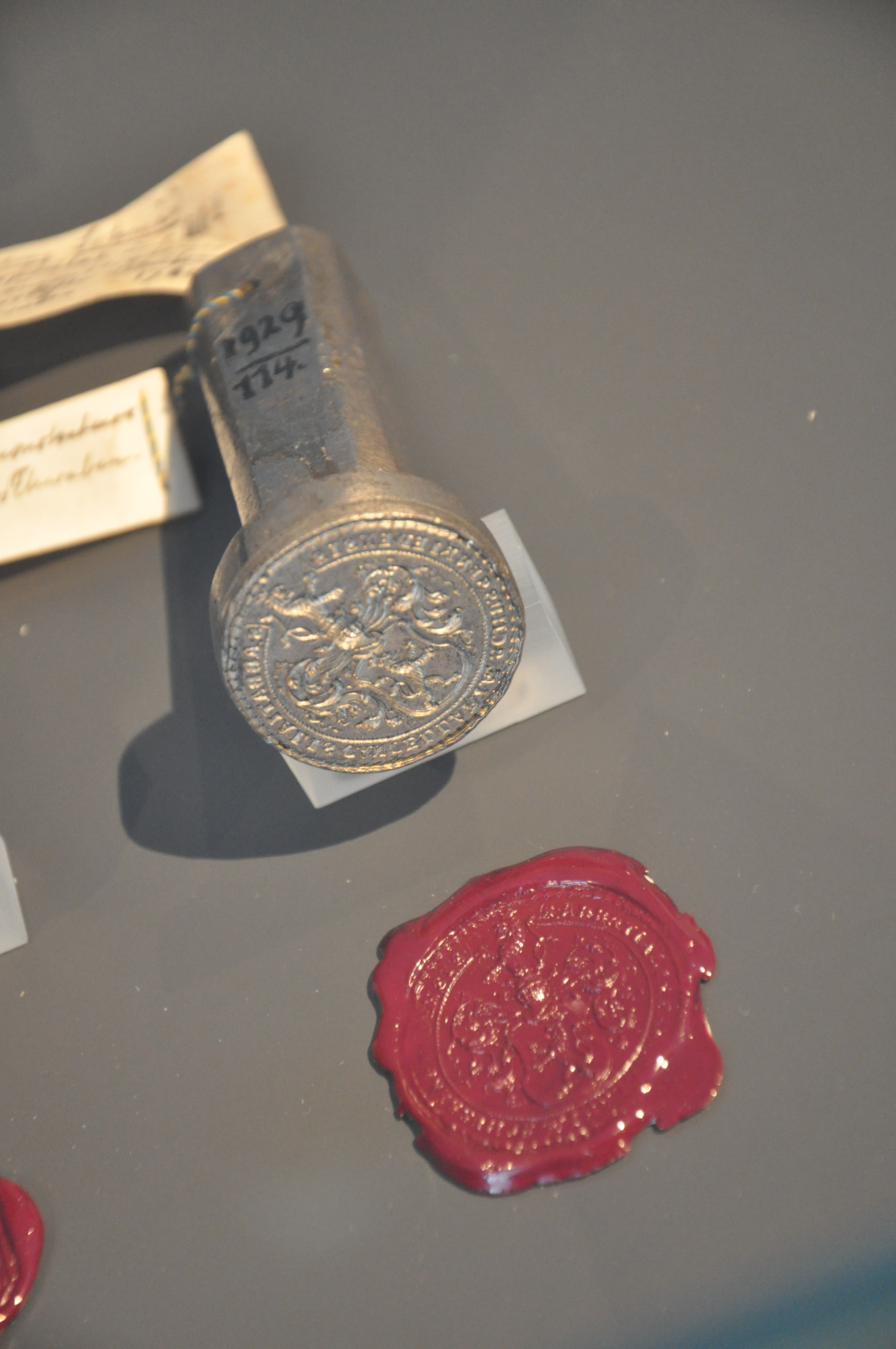 Siegelstock der Klosterkanzlei Schussenried, 17. Jahrhundert; ausgestellt im Neuen Kloster Schussenried